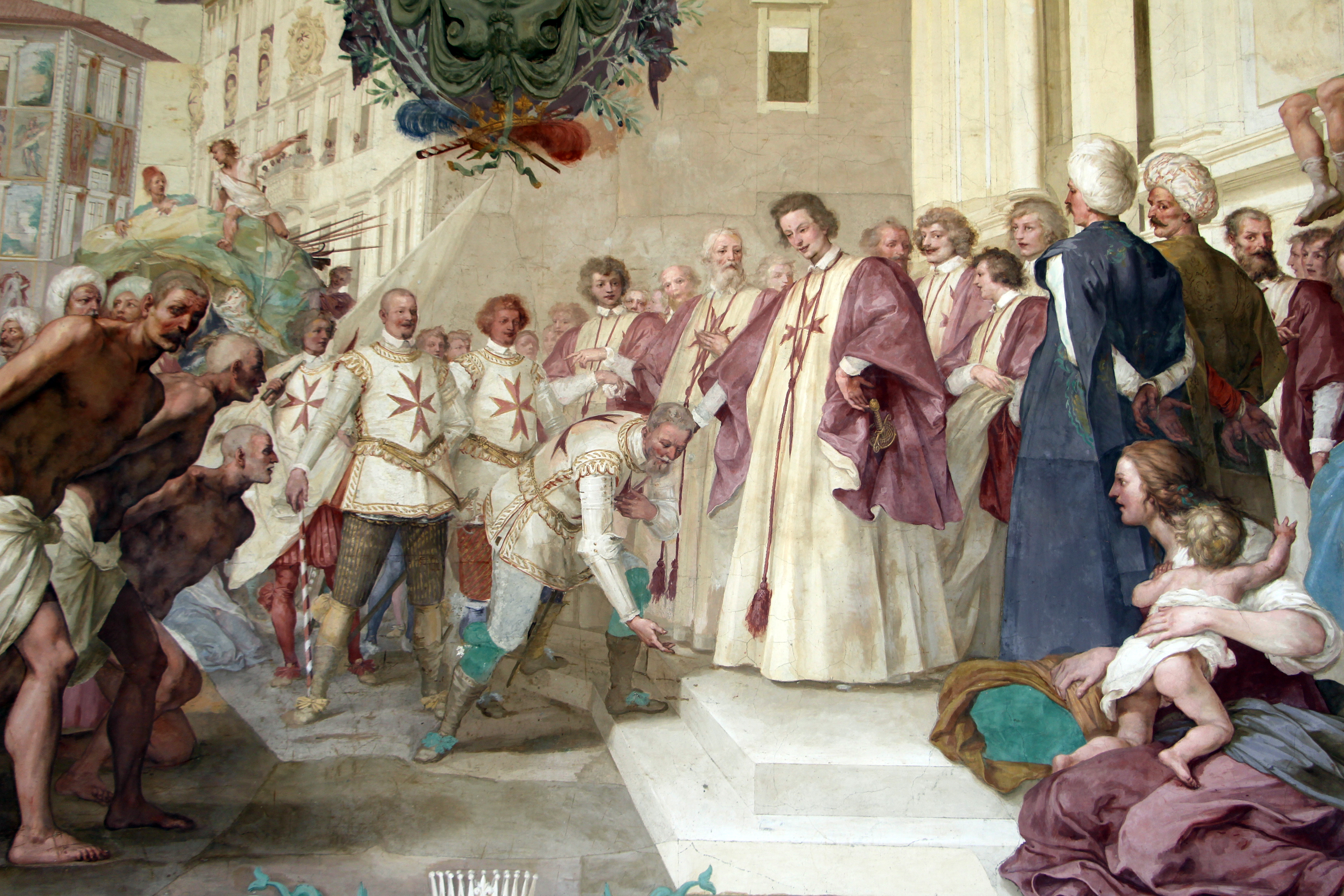 Villa medicea della Petraia - MIBAC The making of this document was supported by Wikimedia CH. (Submit your project!) For all the files concerned, please see the category Supported by Wikimedia CH. This is a photo of a monument which is part of cultural heritage of Italy.